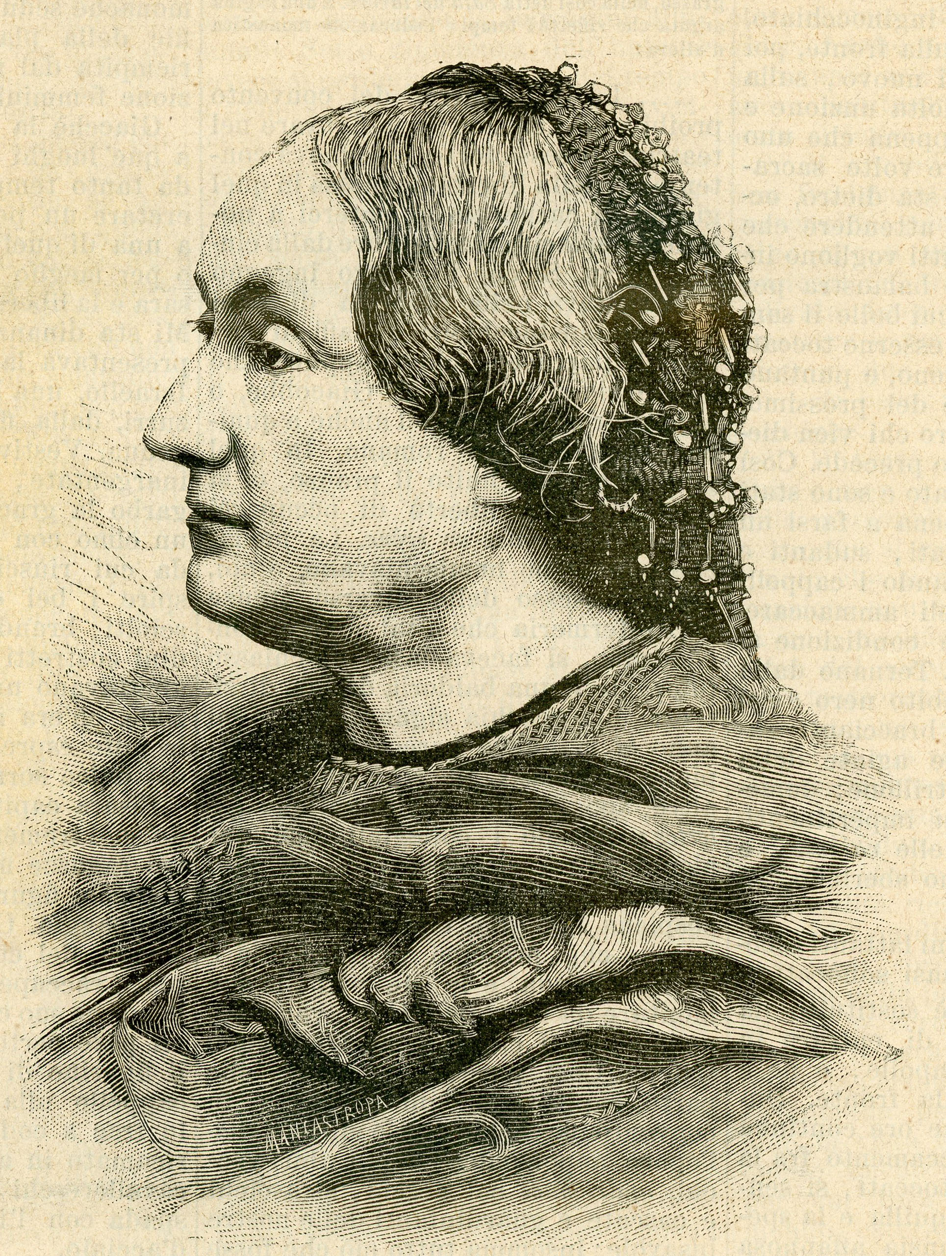 La scrittrice Caterina Percoto, nata in San Lorenzo di Soleschiano, morta il 15 agosto in San Gio. di Manzano (xilografia).